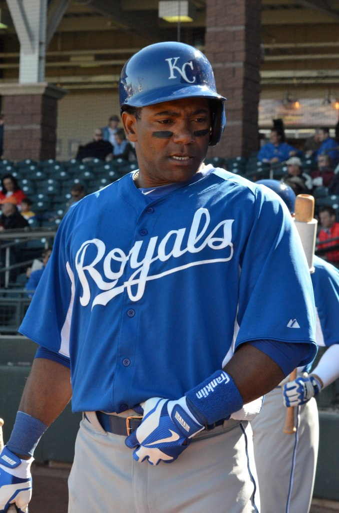 Miguel Tejada